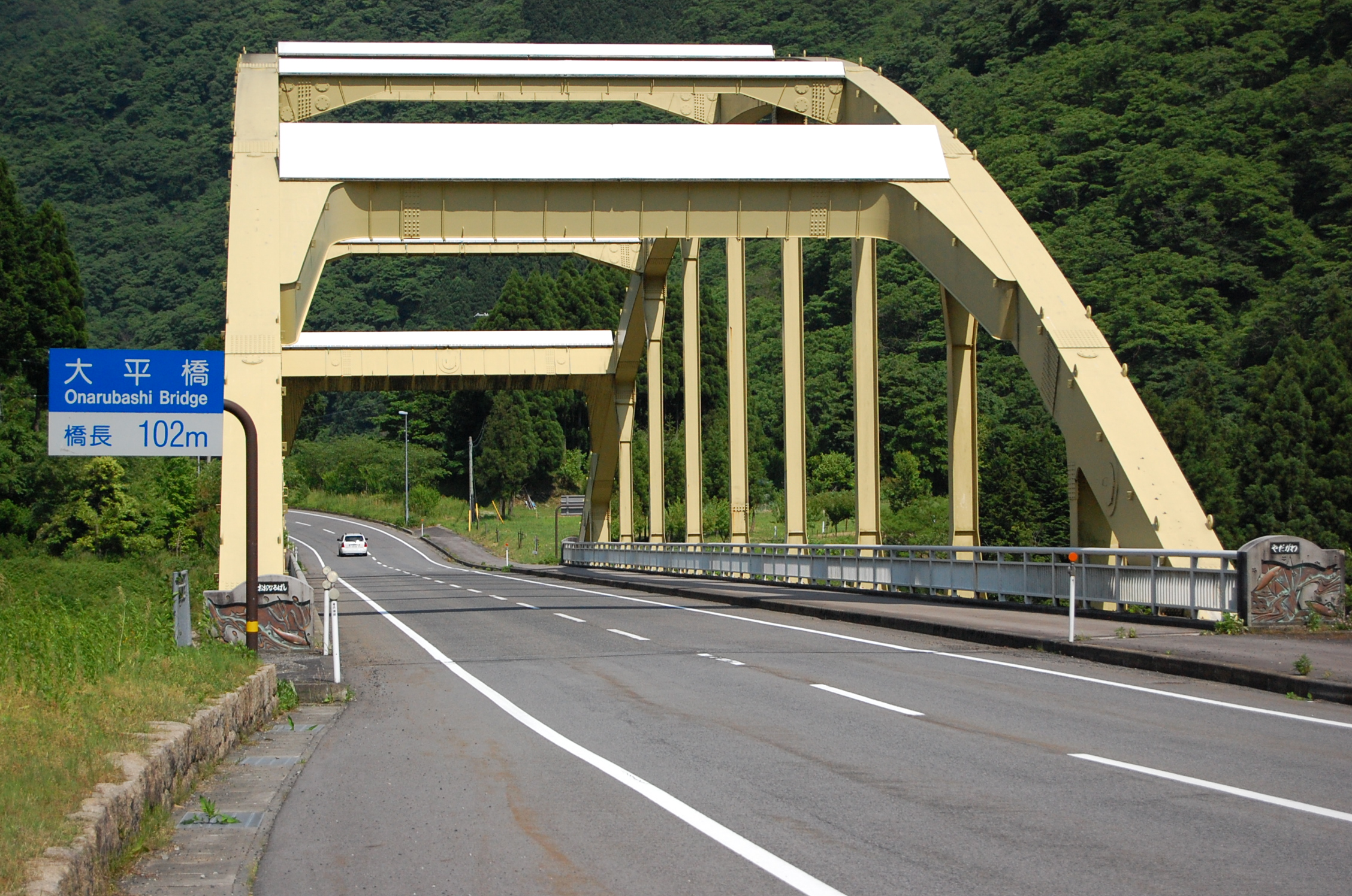 大平橋(おおなるばし)。兵庫県道4号香住村岡線・長瀬にて。